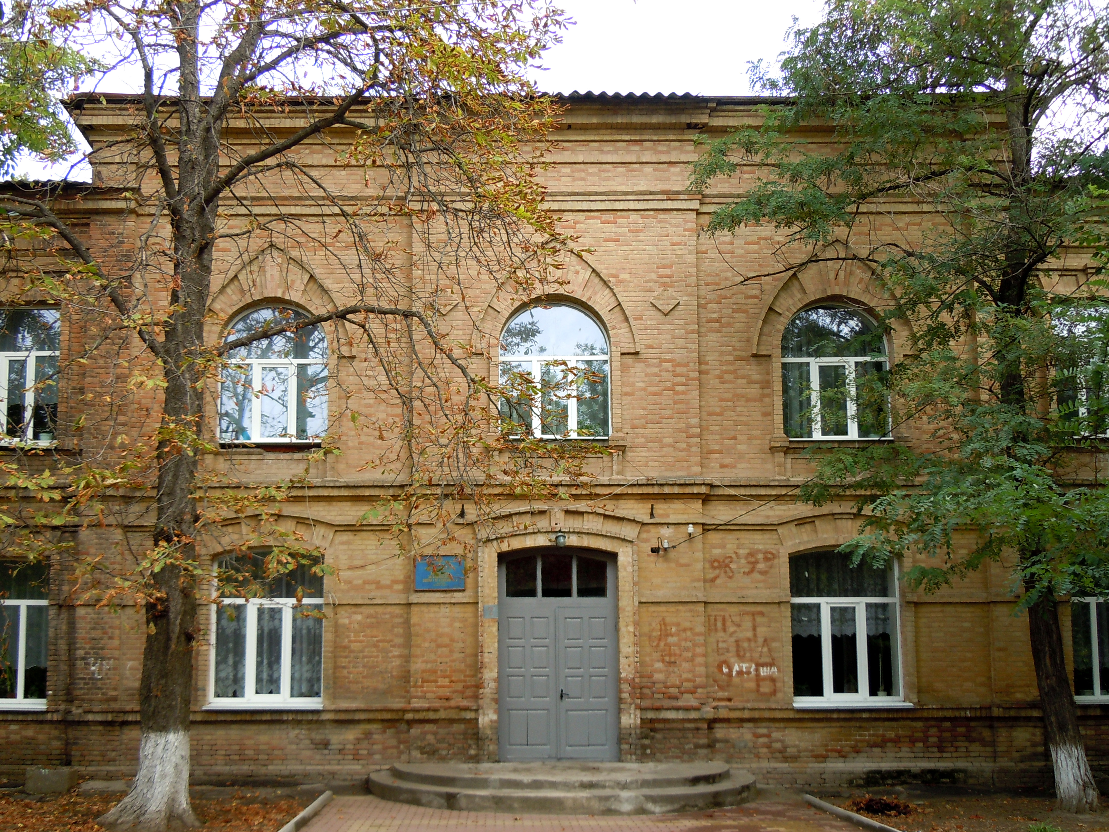 Жіноча гімназія, Болград, 28 червня пл., 2